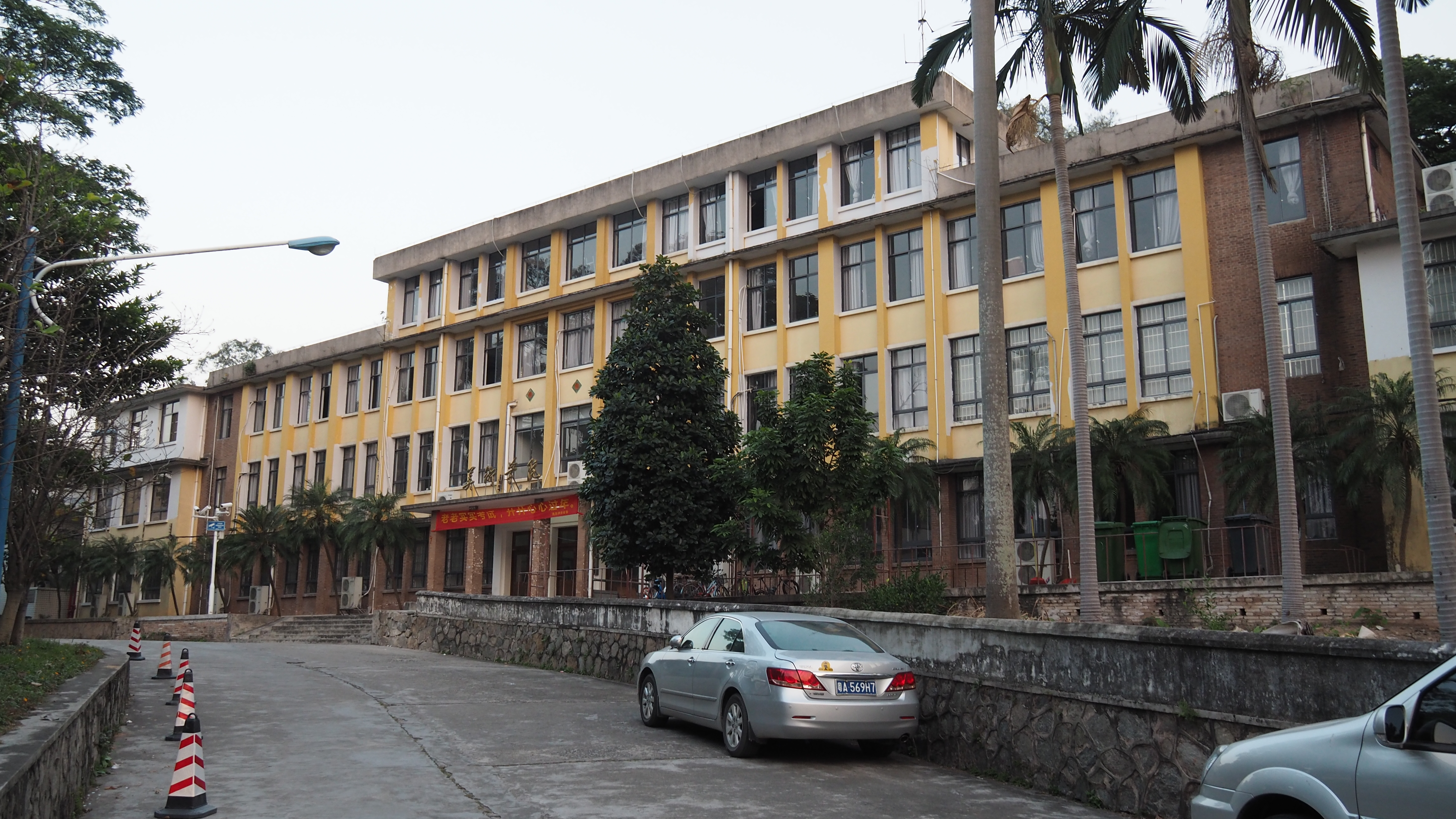 中文（中国大陆）: 位于广东省广州市天河区中山大道西55号华南师范大学内。